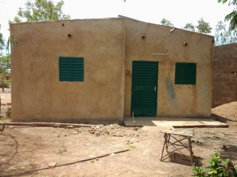 Habitations semi-modernes caractérisées par des maisons plus grandes et construites en briques de ciment avec une toiture plus ou moins moderne